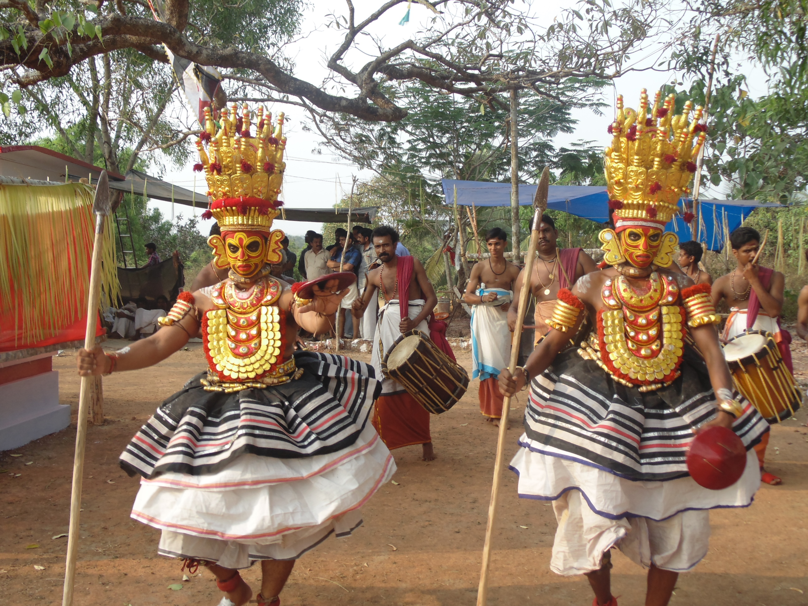 Thirayattam- Surviving tradition of kerala, India